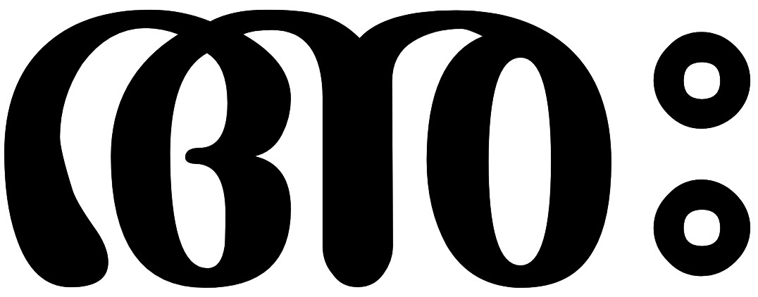 അഃ അക്ഷരം